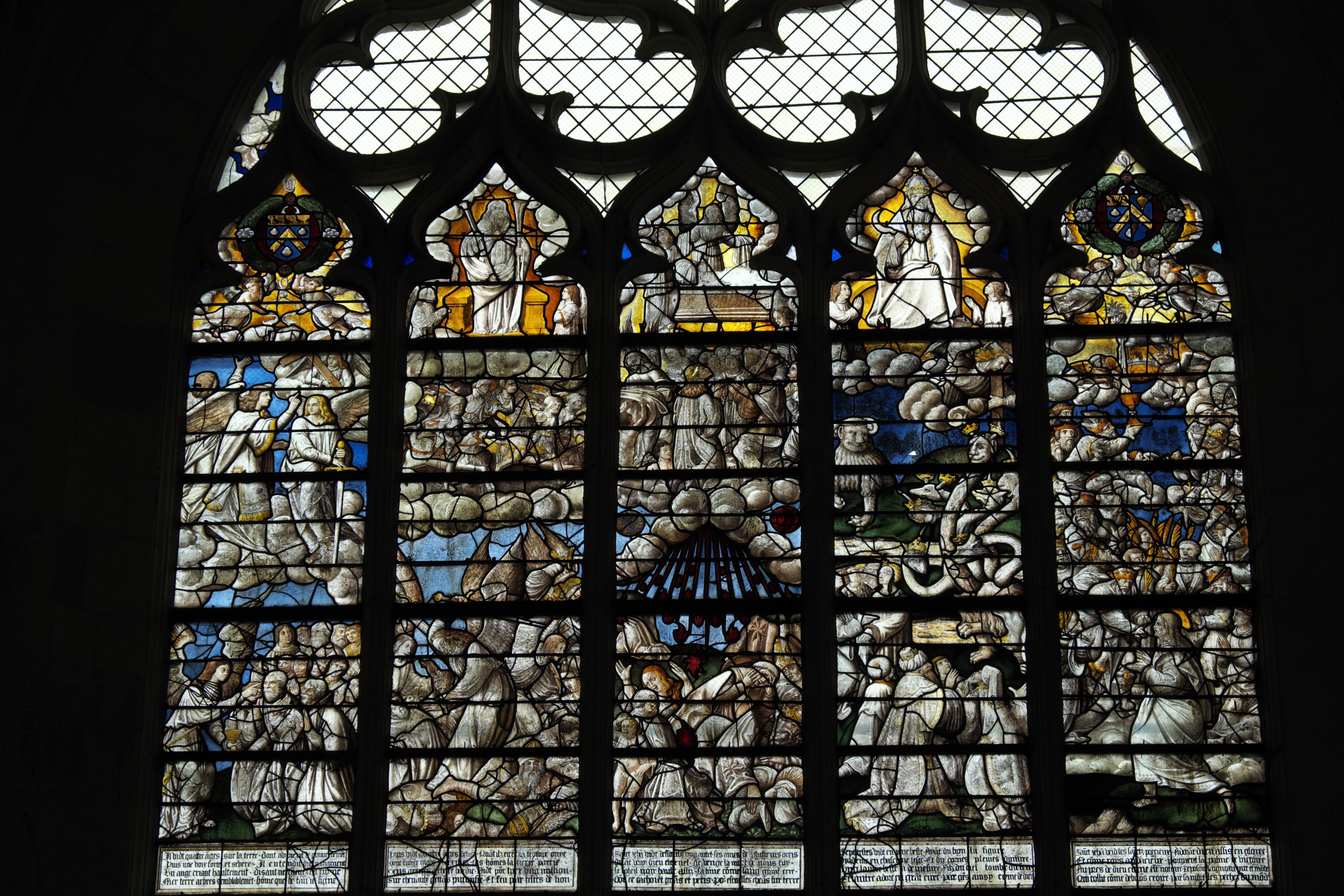 Katholische Kirche Saint-Georges in Chavanges im Département Aube (Champagne-Ardenne/Frankreich), Bleiglasfenster aus dem 16. Jahrhundert, Darstellung: Apokalypse (Ausschnitt).